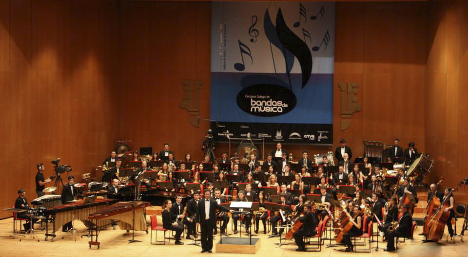 Banda de Música Municipal de Valga no VII Certame Galego de Bandas de Música Populares